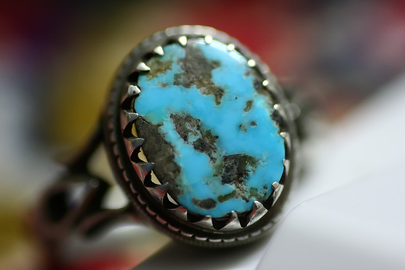 انگشتر فیروزه نیشابور عکس: امیررضا توسلی